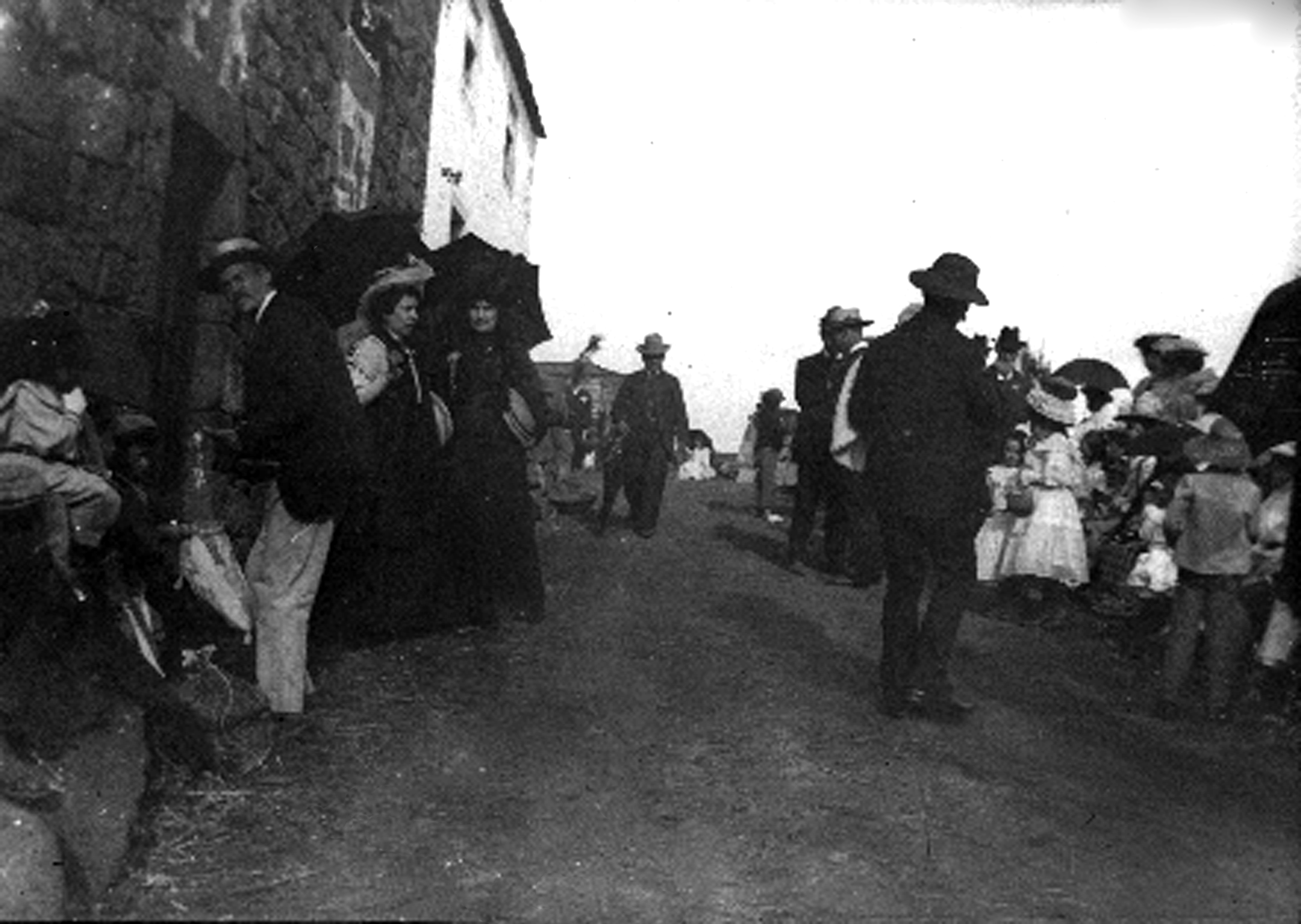 Fajã de São João, festas populares, ilha de São Jorge, Arquivo de Villa Maria, ilha Terceira, Açores